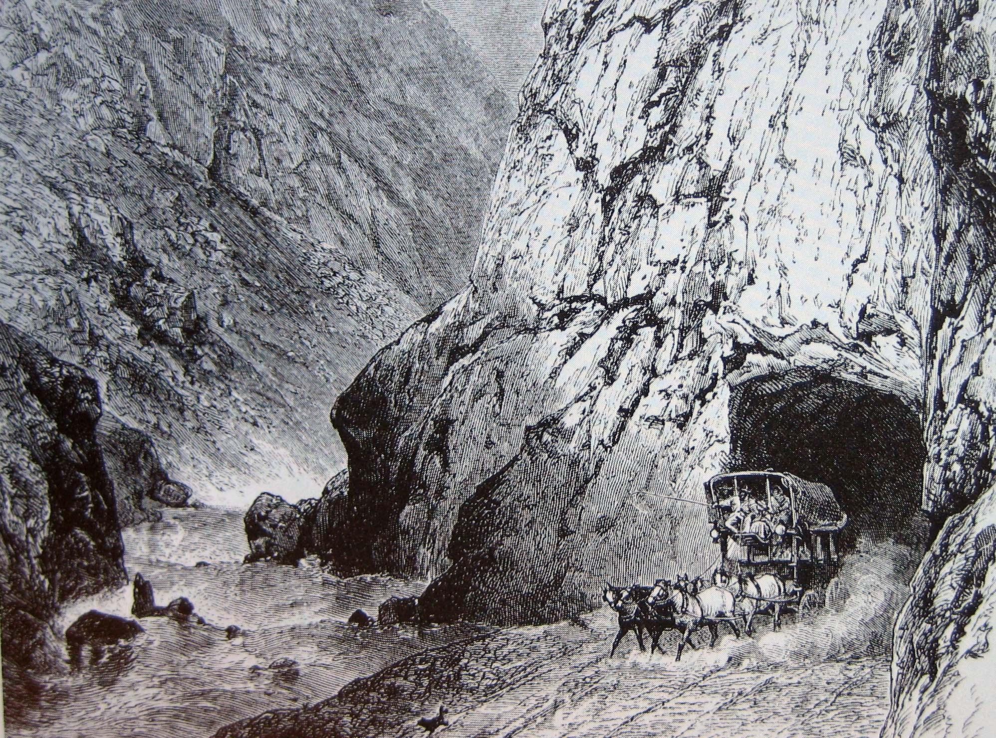 Postkutsche vor dem Urner Loch